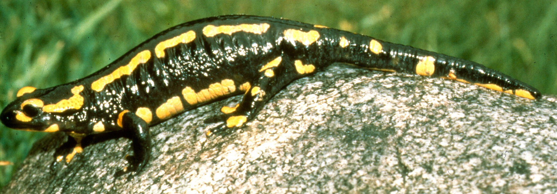 (Salamandra salamandra), – Barred fire salamander (male)